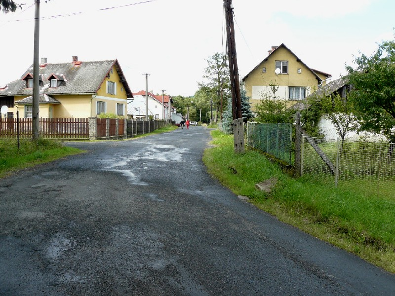 Část obce mezi domy